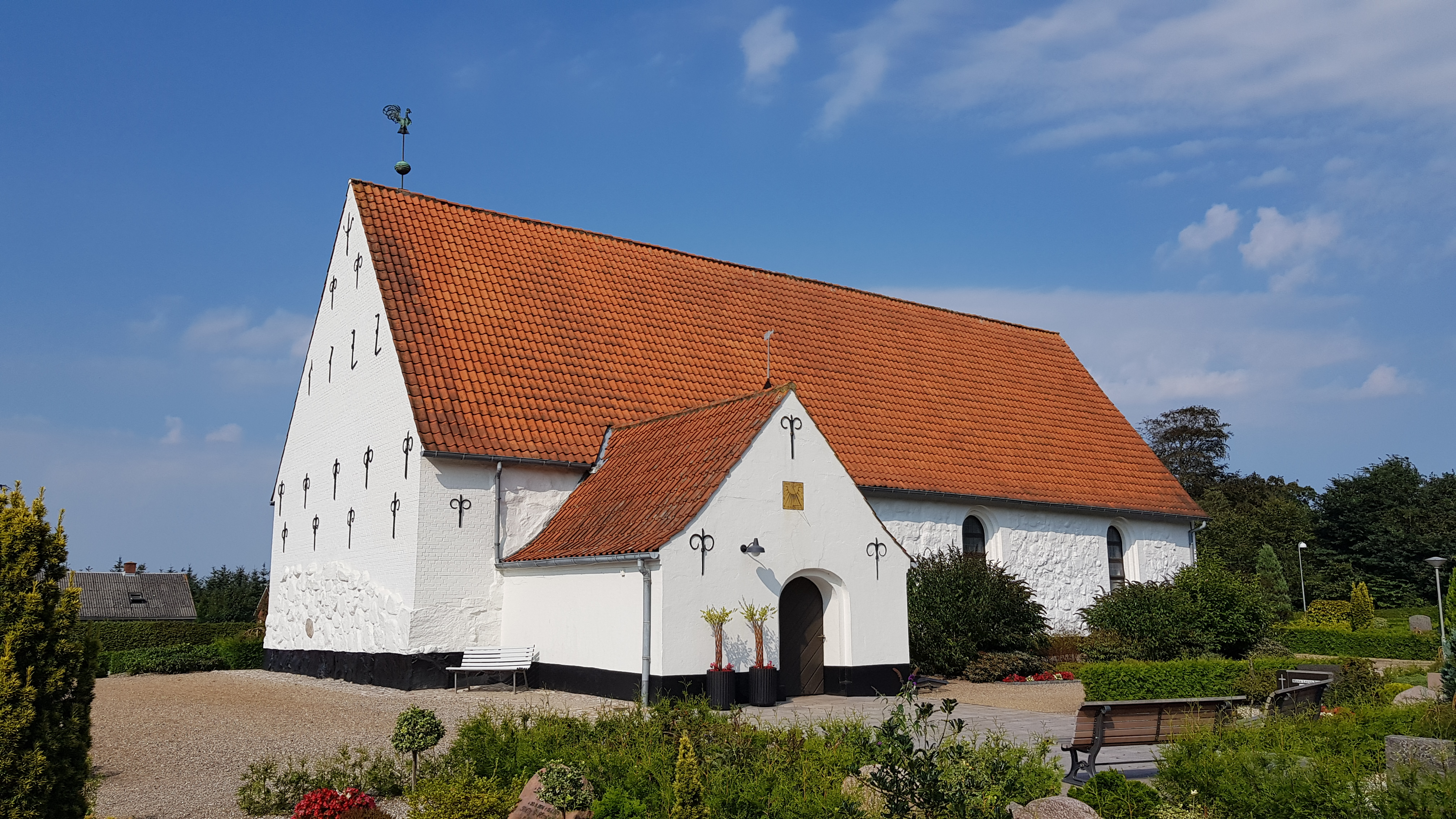 Hjordkær Kirke